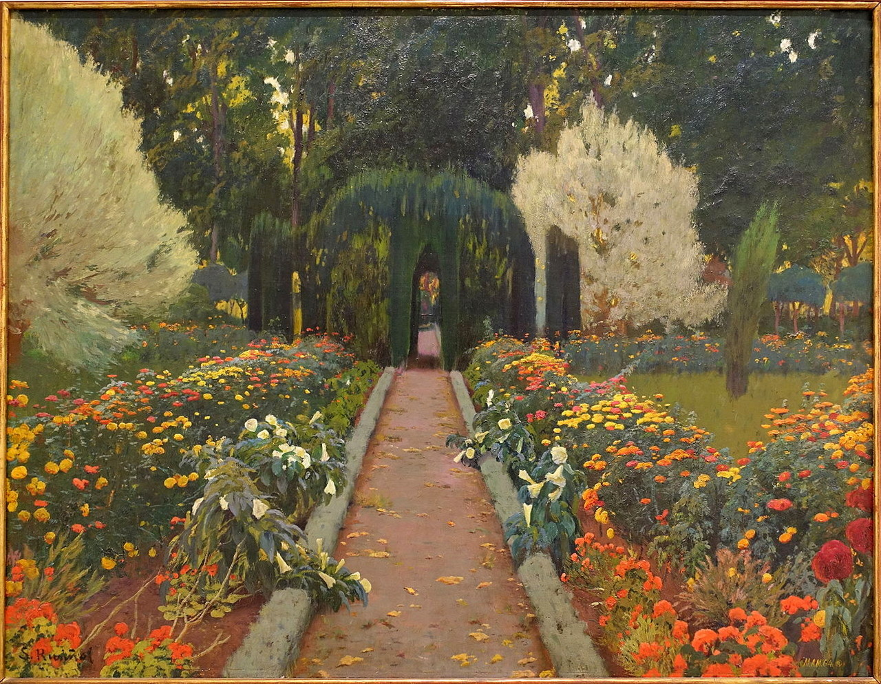 Aranjuez Garden, Arbor, II